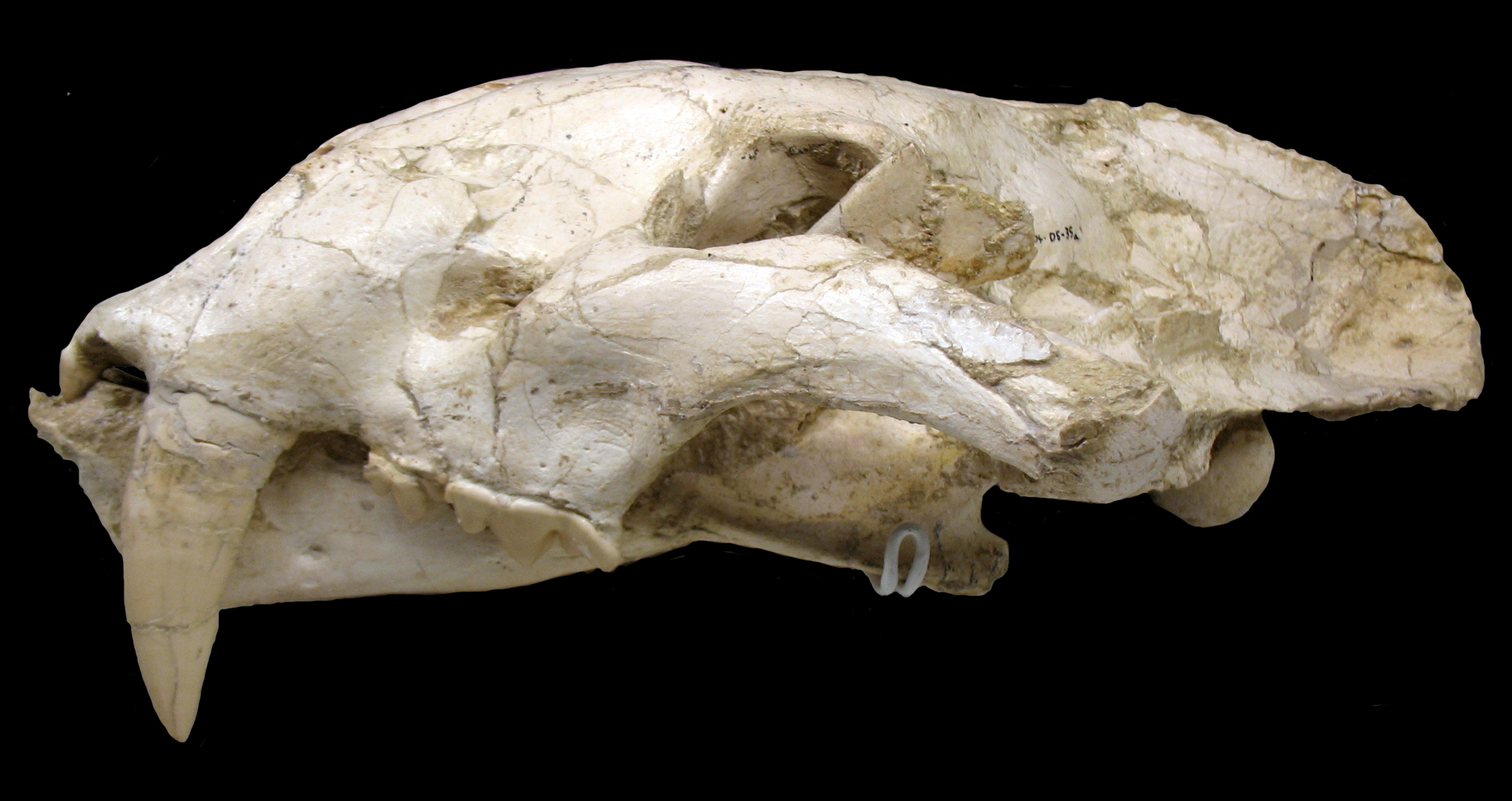 Cráneo de Machairodus aphanistus macho. Yacimientos del Cerro de los Batallones, Torrejón de Velasco, Madrid, España. Exposición temporal "La colina de los tigres dientes de sable. Los yacimientos miocenos del cerro de los Batallones (Torrejón de Velasco, Comunidad de Madrid)" en el Museo Arqueológico Regional (MAR), Alcalá de Henares (Madrid)